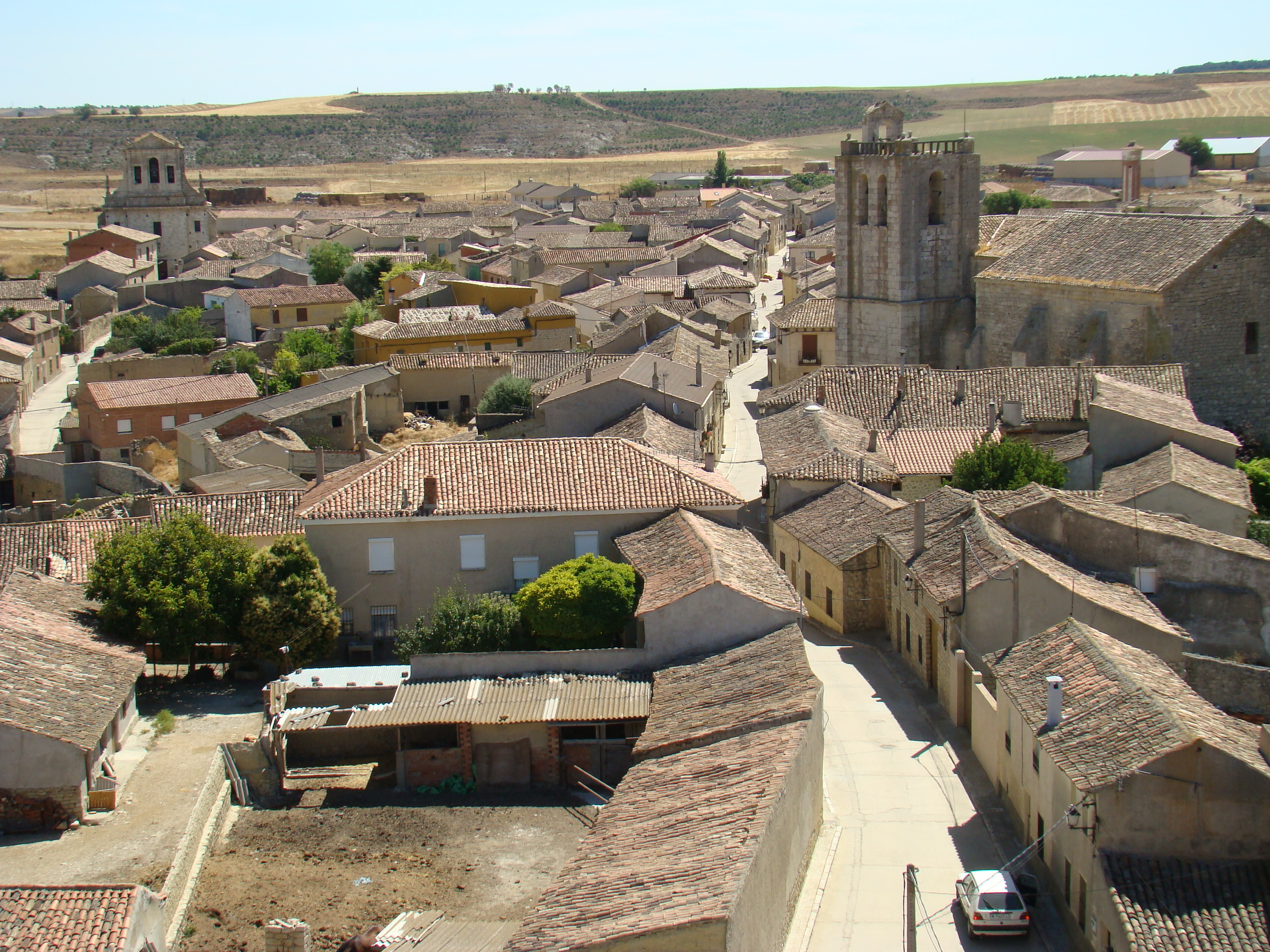 Montealegre de Campos en la provincia de Valladolid (España). El casco antiguo es considerado BIC (Bien de Interés Cultural). Vista desde el castillo.